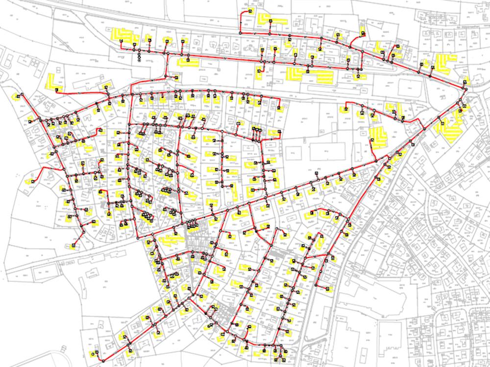 Nahwärmenetzplan „Bonndorf West“, Bioenergiedorf Bonndorf im Schwarzwald